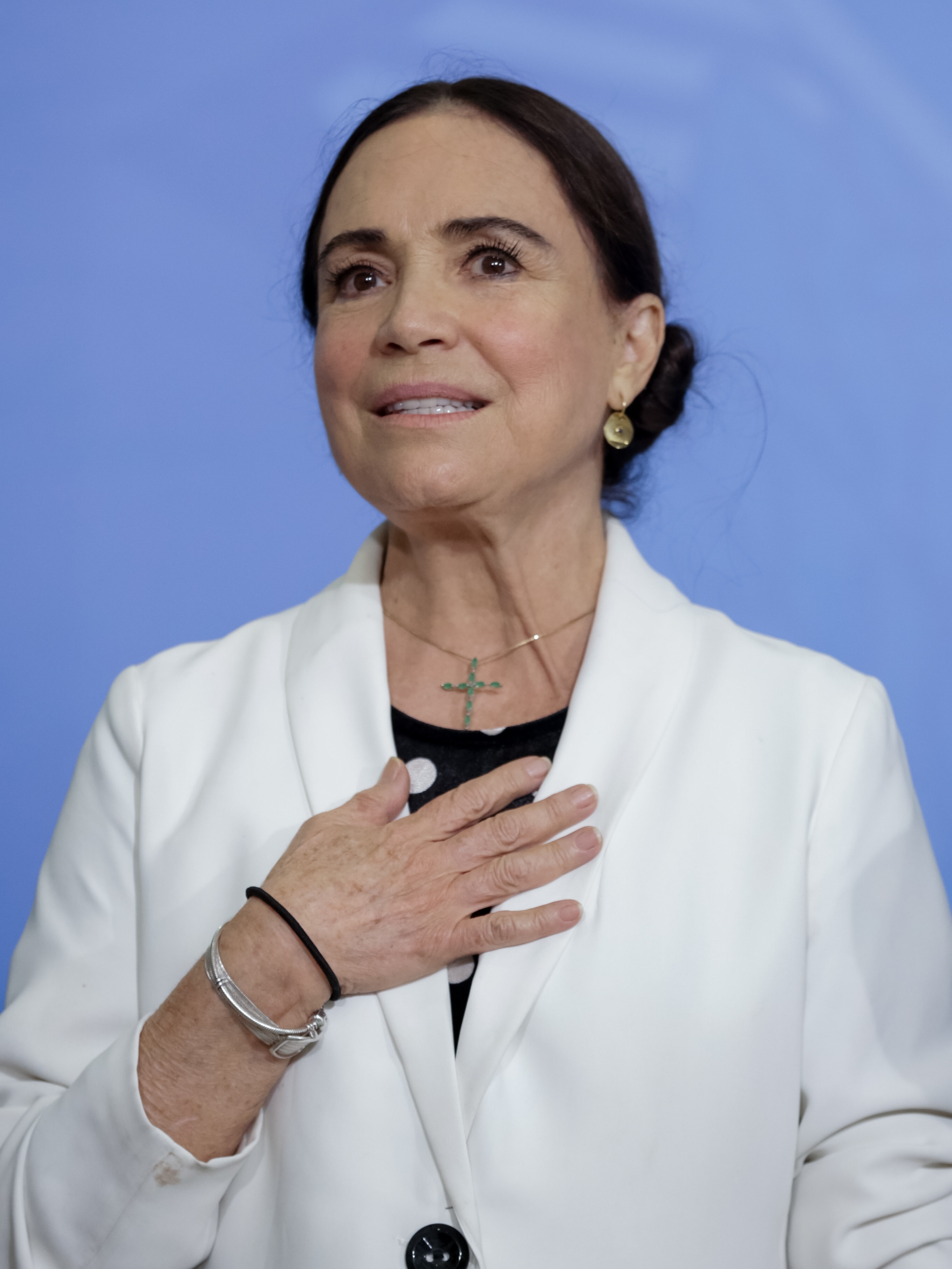 (Brasília - DF, 04/03/2020) Presidente da República Jair Bolsonaro, durante cerimônia de Posse da Secretária Especial da Cultura do Ministério do Turismo, Regina Duarte.